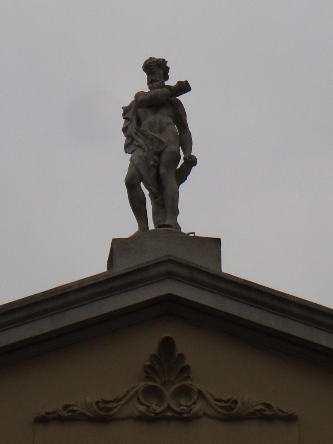 Detalhe da fachada da Casa Torelly em Porto Alegre.